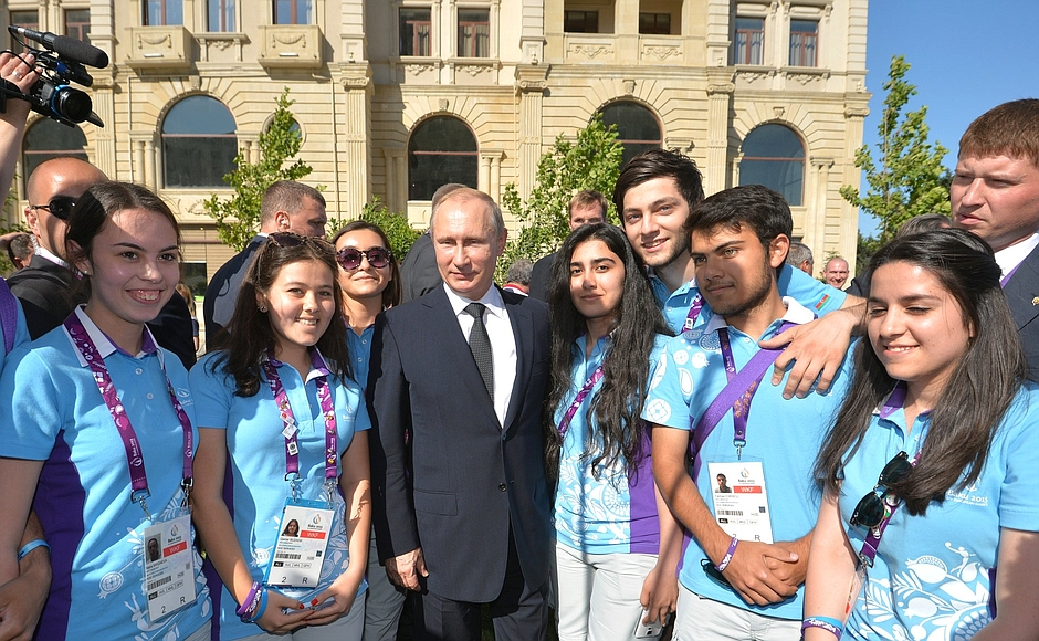 Путин с волонтёрами I Европейских игр в Баку